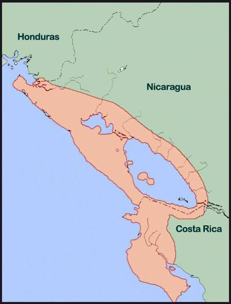 Región arqueológica de la Gran Nicoya. Para su estudio se ha dividido en dos subregiones: la subregión Norte o Pacífico Nicaragüense, entre el golfo de Fonseca (Honduras) y el golfo de Papagayo (Costa Rica), y la subregión Sur o Guanacaste, entre el golfo de Papagayo y el golfo de Nicoya (Costa Rica).